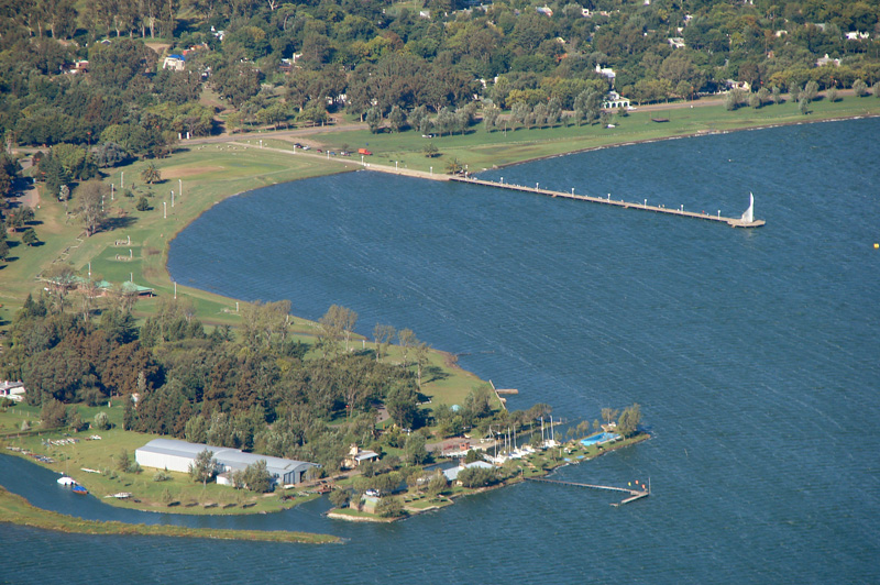 Parque Natural Laguna de Gómez en la ciudad de Junín